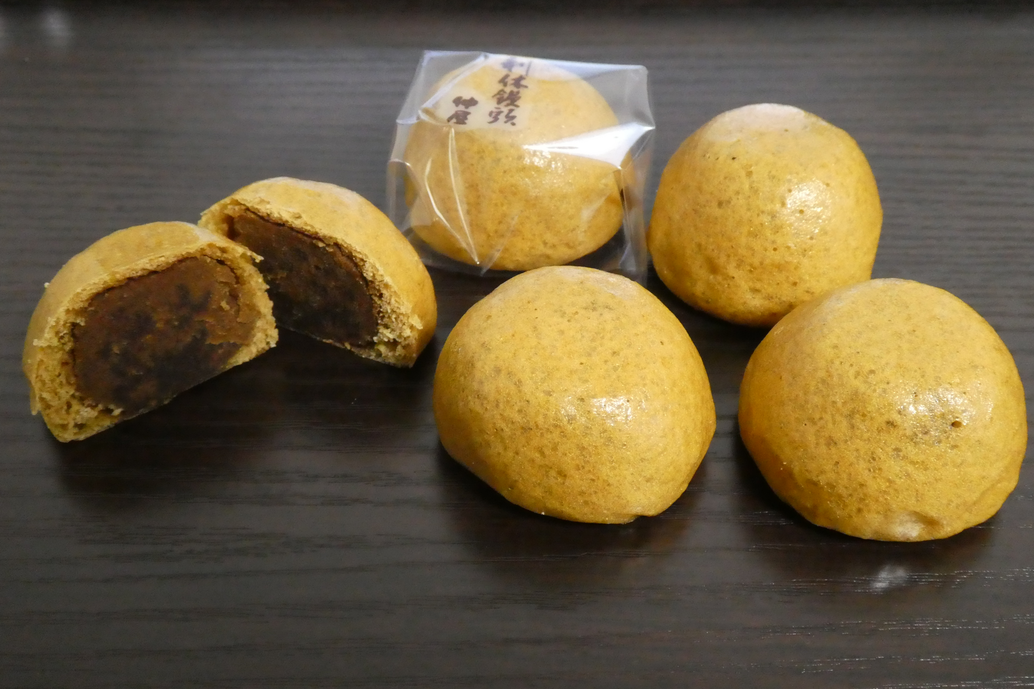 浜田市仲屋の利休饅頭